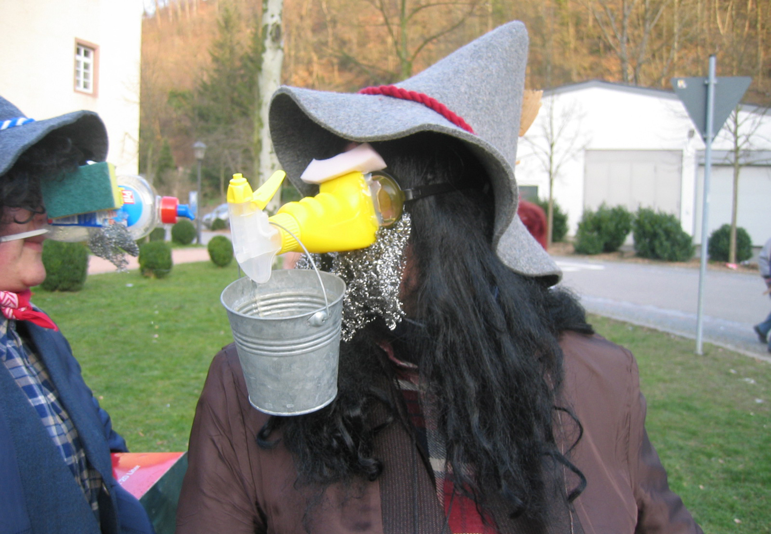 Wolfach, Schwarzwald: Nasenzug am Faschingsdienstag. Unter solchen gesichtsbedeckenden Masken verbergen sich oft Frauen, die Gefahr laufen, in den Brunnen auf dem Marktplatz geworfen zu werden.